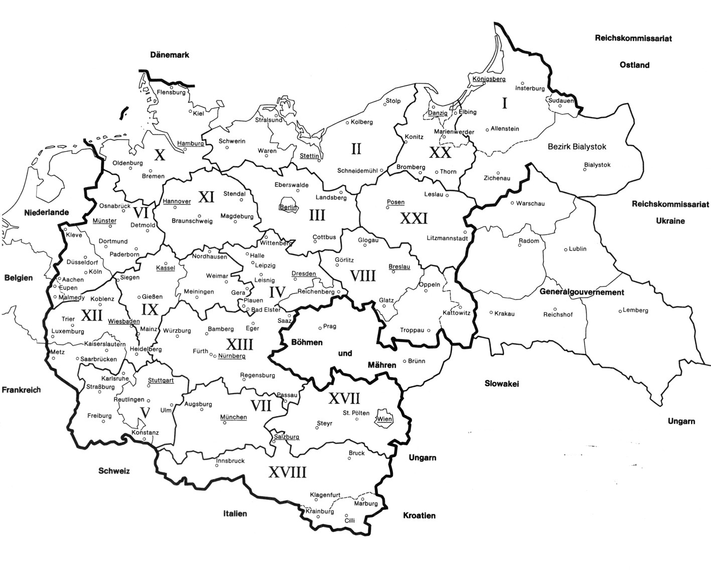 Les districts militaires ou Wehrkreise du Grossdeutches Reich en 1943-1944.